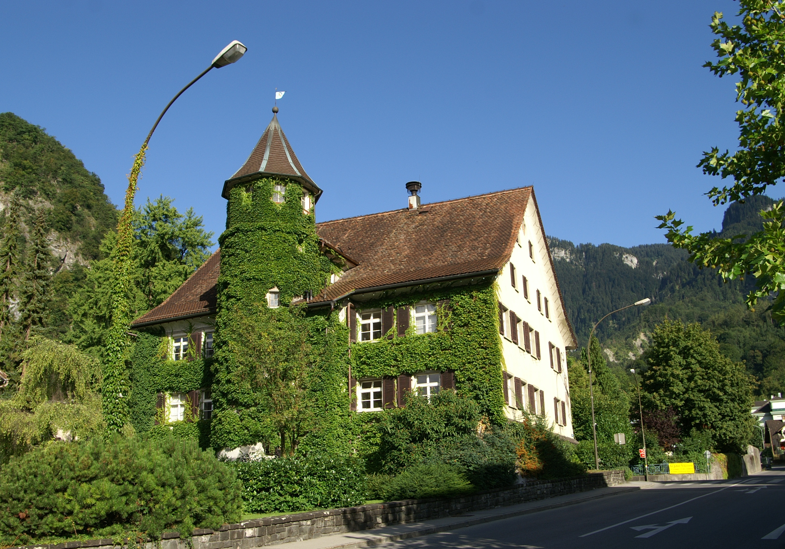 aus dem DEHIO Vorarlberg 1983: Kaiser-Franz-Joseph-Strasse Nr.4 Rathaus, erbaut 1567 als ursprüngliches Gästehaus zum Komplex der herrschaftlichen Gebäude gehörig. 3geschossig mit 4 Fensterachsen zur Strasse, 2armige Freitreppe zu erhöhtem Eingang, Korbbogenportal (Bekrönung durch Wappen vermutlich 1841), Zwerchgibel: rückseitig runder Treppenturm; in Hohenems, Vorarlberg. Blick von der Bahnhofstrasse (Haus-Rückseite)